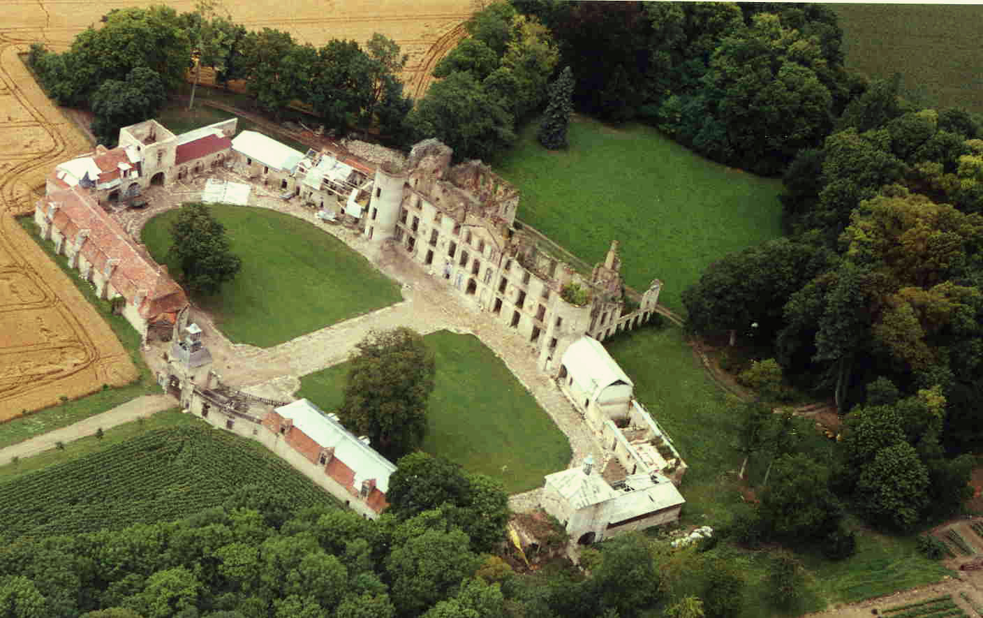 Vue aérienne 2000 du Chateau de Villemont (Commune de Vensat - Puy de Dôme - Auvergne - FRANCE)